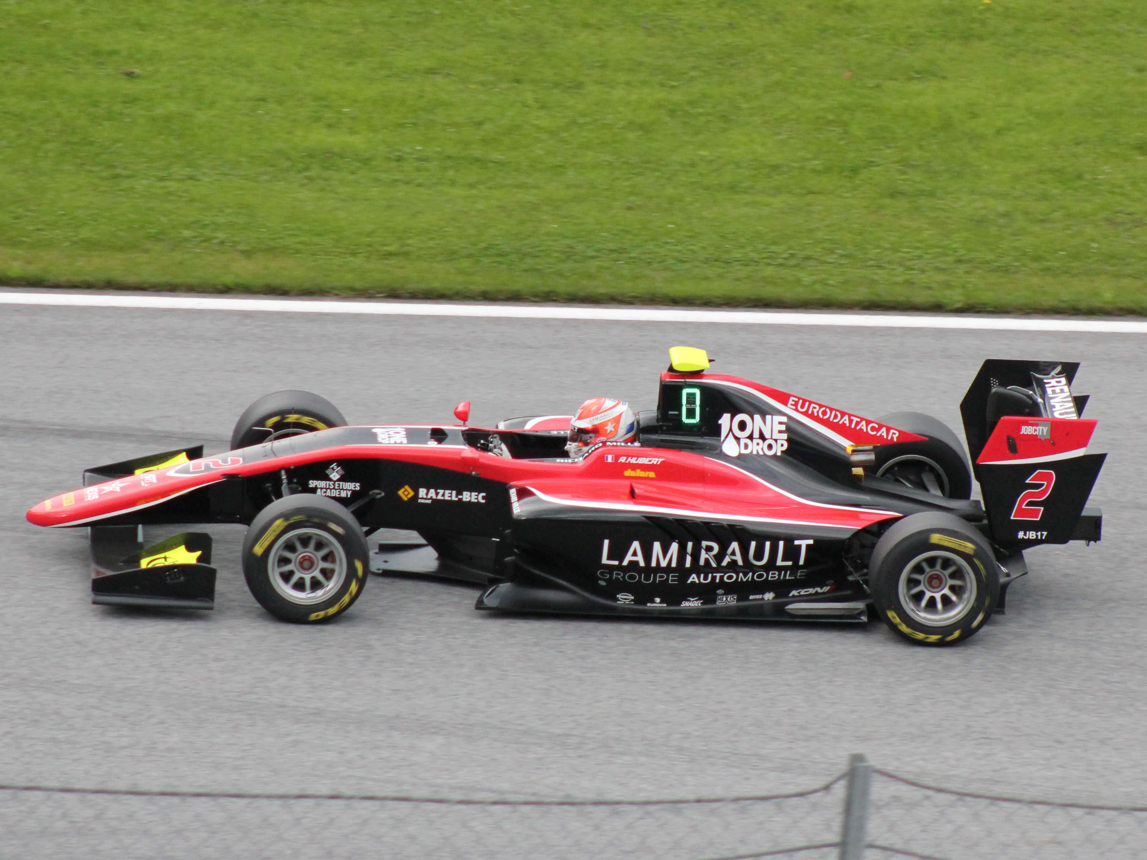 02 Anthoine Hubert beim Rennwochenende in Österreich 2018 (4)